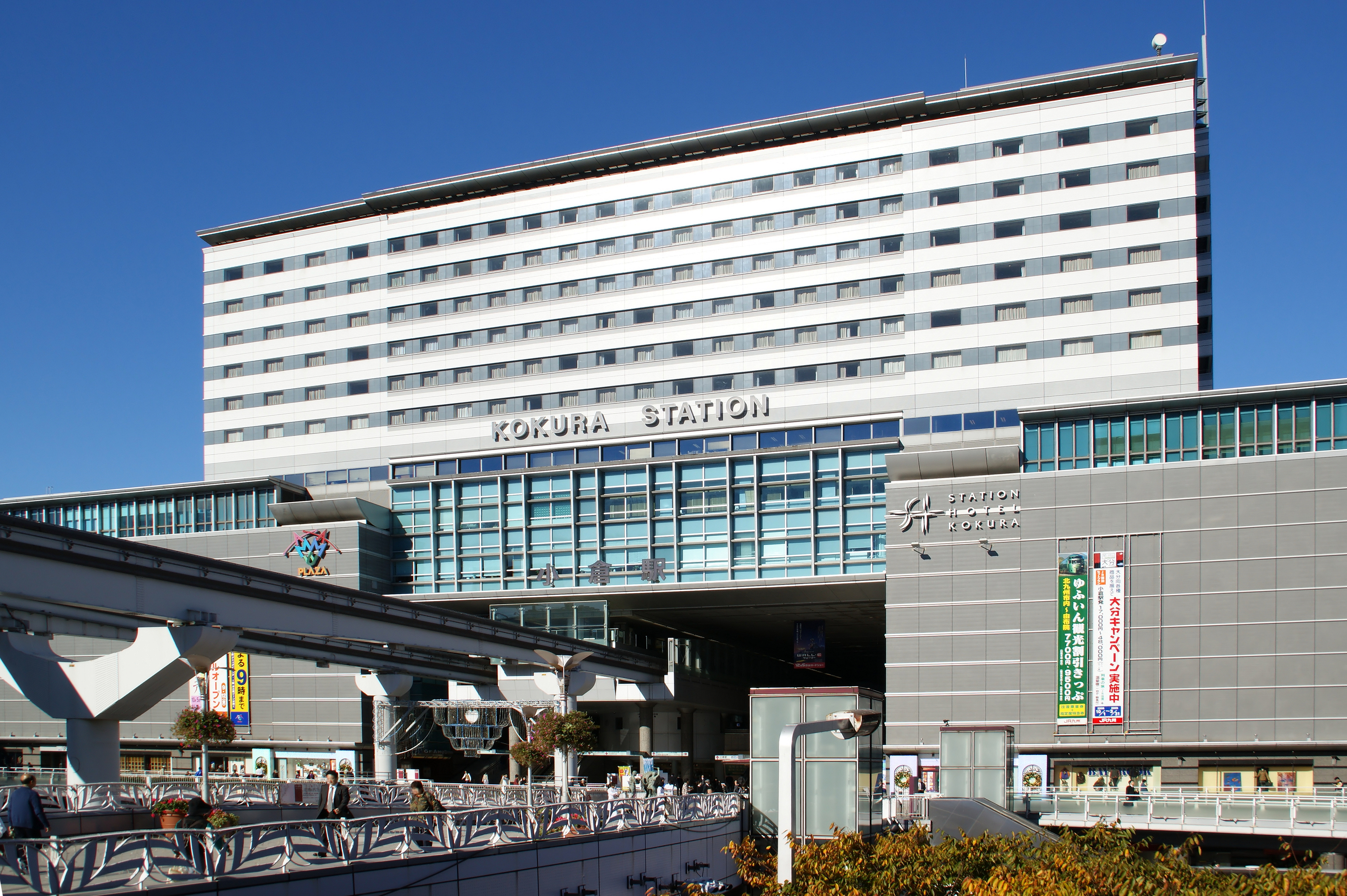 Kyushu Railway, Kokura Station.(Kokura-Kita Ward, Kitakyushu City, Fukuoka Prefecture, Japan)